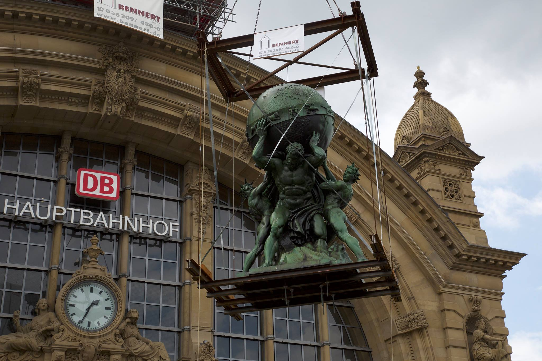 Die Atlas Figurengruppe von Gustav Herold wird nach der Restaurierung zurück auf das Dach des Frankfurter Hauptbahnhofs gehoben